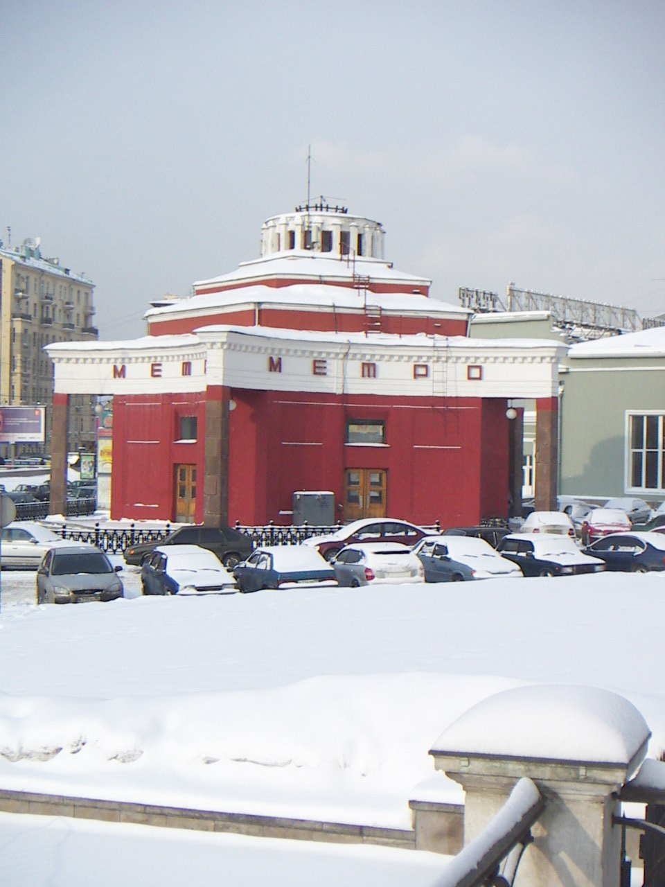 Наземный павильон станции метро "Арбатская" Филёвской линии в Москве